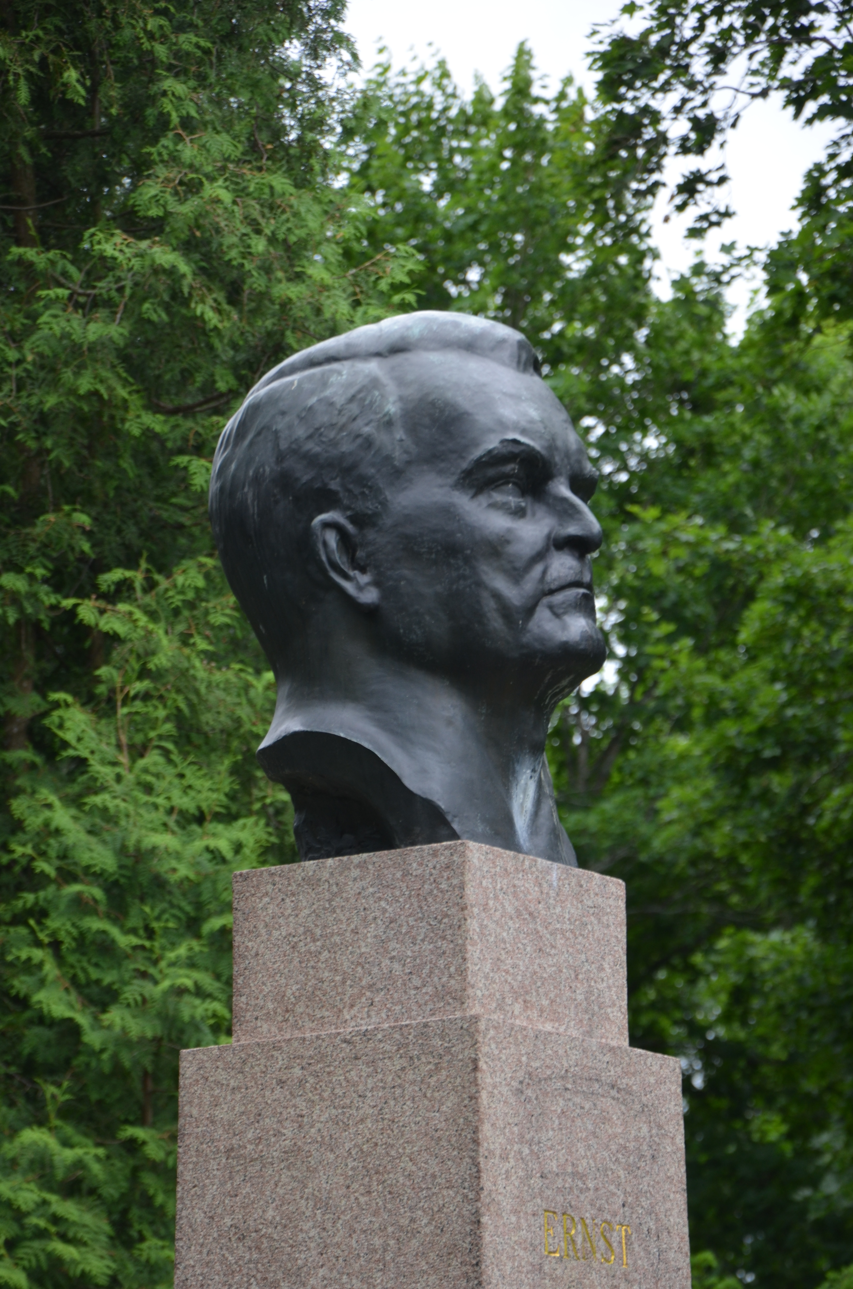 Porträtthuvud över Ernst Westerlund, modellarat av Ida Thoresen, brons, 1931, Skolparken i Enköping